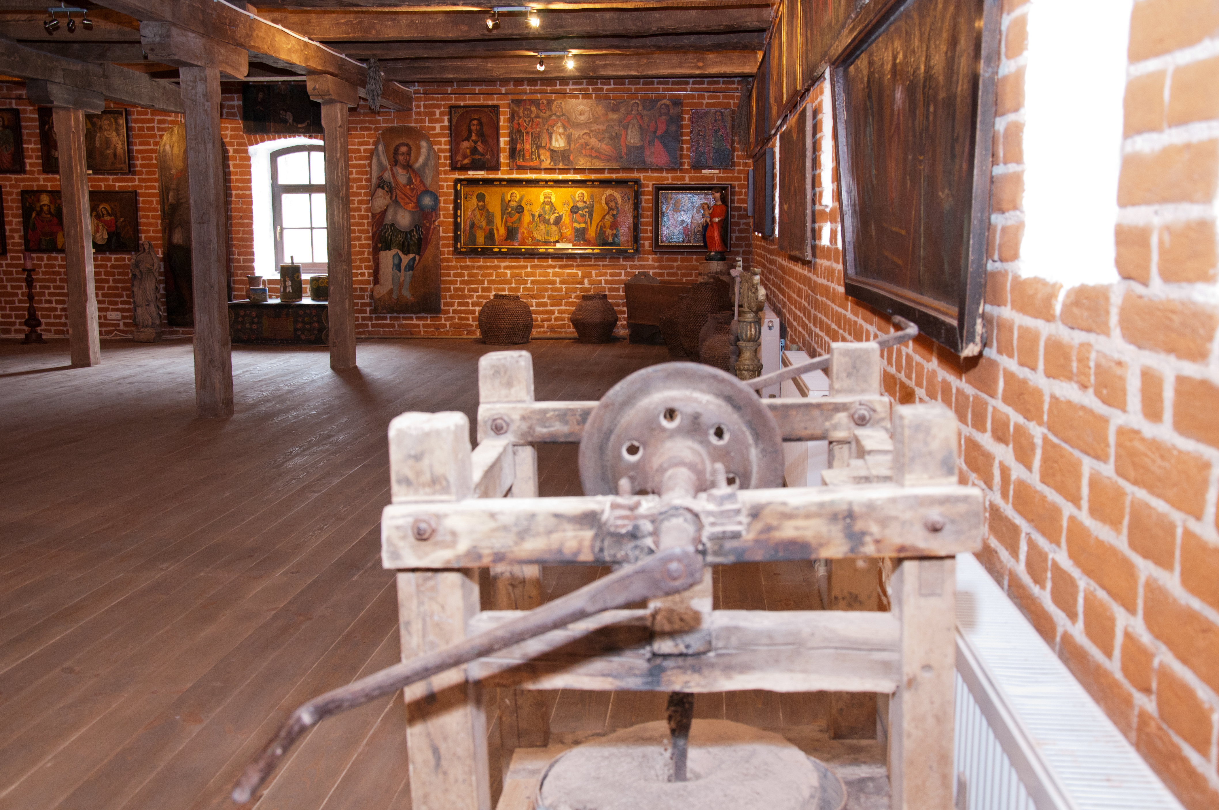 Музей украинской домашней иконы. Фрагмент экспозиции. Украинские домашние иконостасы и предметы быта.